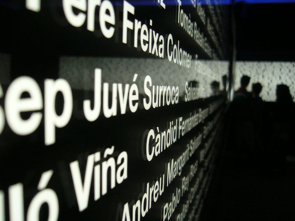 Museu Memorial de l'exili de la frontera